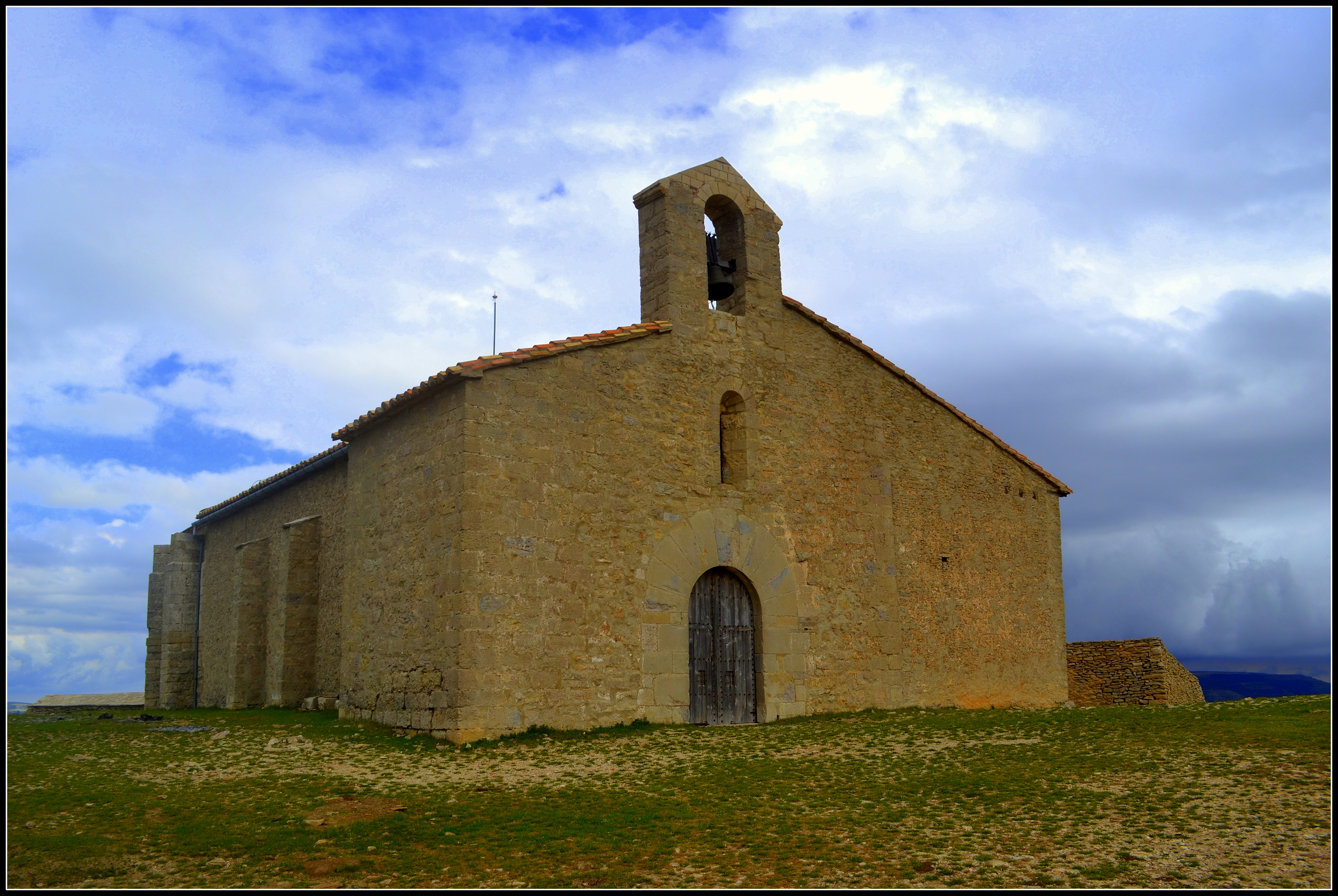 Ermita de Sant Pere (Castellfort)